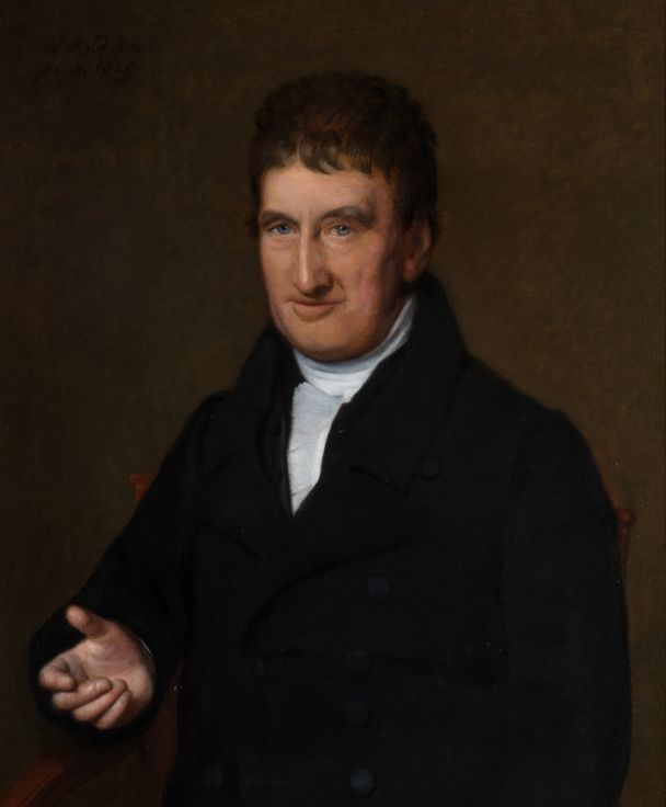 Jan Willem de Crane (1758-1842), letterkundige en ien fan de stifters fan it Frysk Genoatskip.